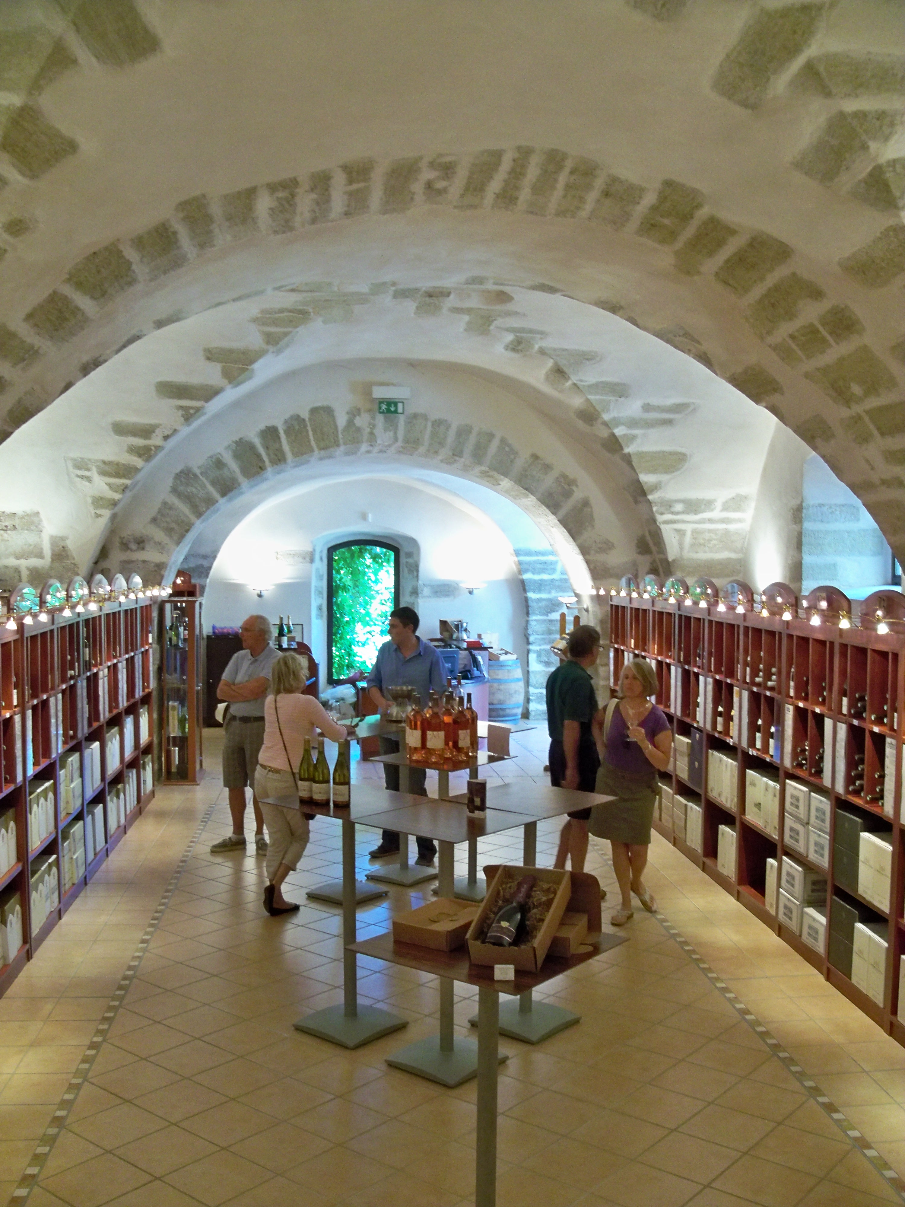 Caveau, chartreuse de Bonpas (Vaucluse)